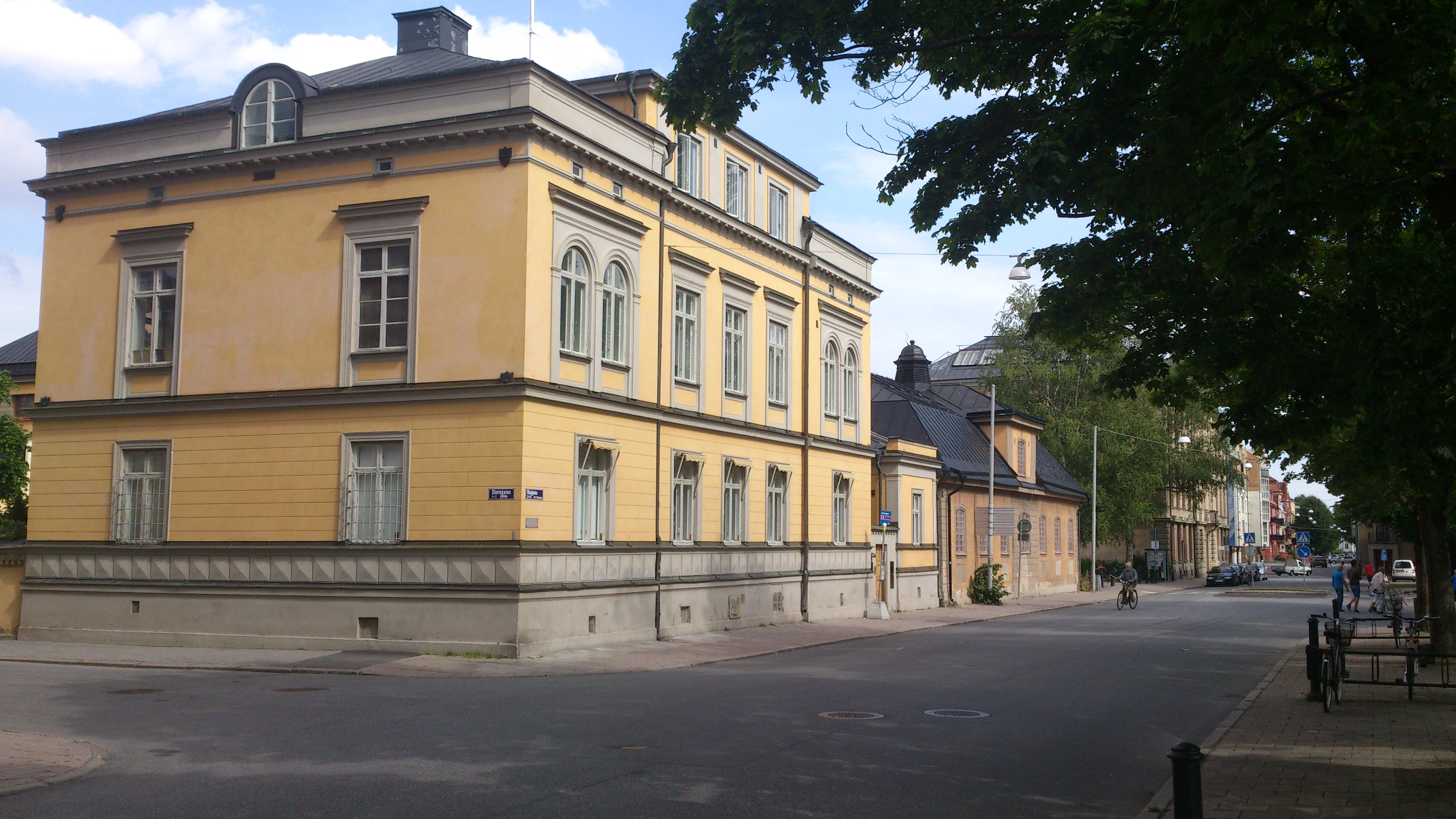 Olaigatan 21 i Örebro. Före detta stabsbyggnad för Livregementets husarer, Livregementets grenadjärer, Örebro försvarsområde, Redovisningsavdelning Bergslagen